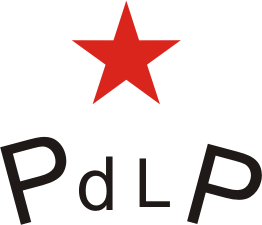 Emblema del Partido de los Pobres, grupo guerrillero mexicano desaparecido